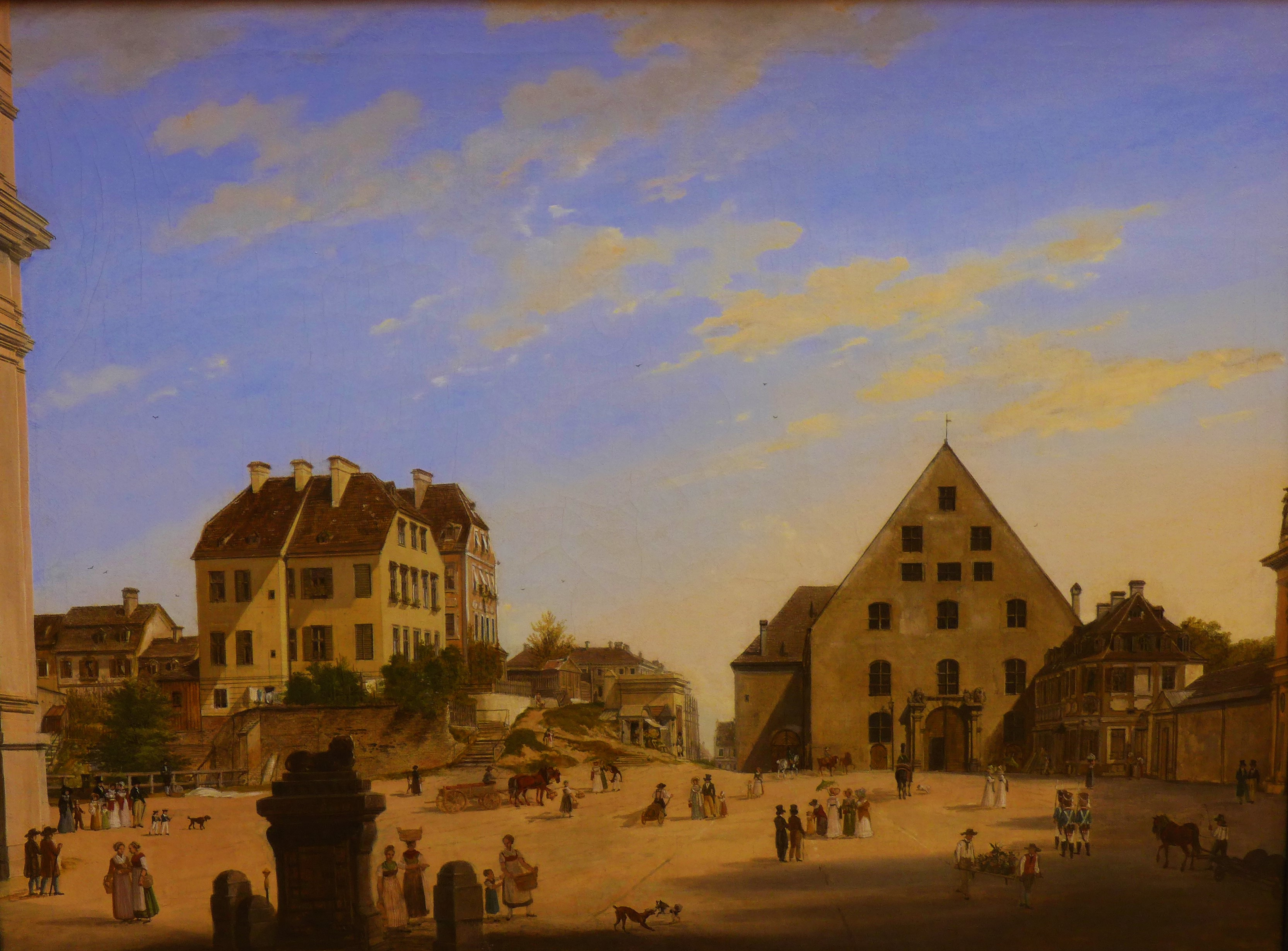 Beginn der heutigen Ludwigstraße am Odeonsplatz mit Blick in Richtung Schwabing im Jahr 1822, links die Theatinerkirche, rechts der Eingang zum Hofgarten, Gemälde von Domenico Quaglio (1787-1837): Die alte Reitschule mit dem Café Tambosi im Jahr 1822 (Neue Pinakothek, München, Inventar-Nr. WAF 786)